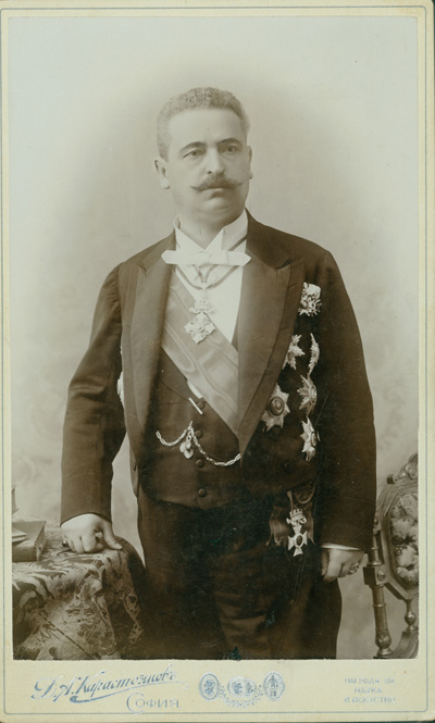 Константин Стоилов